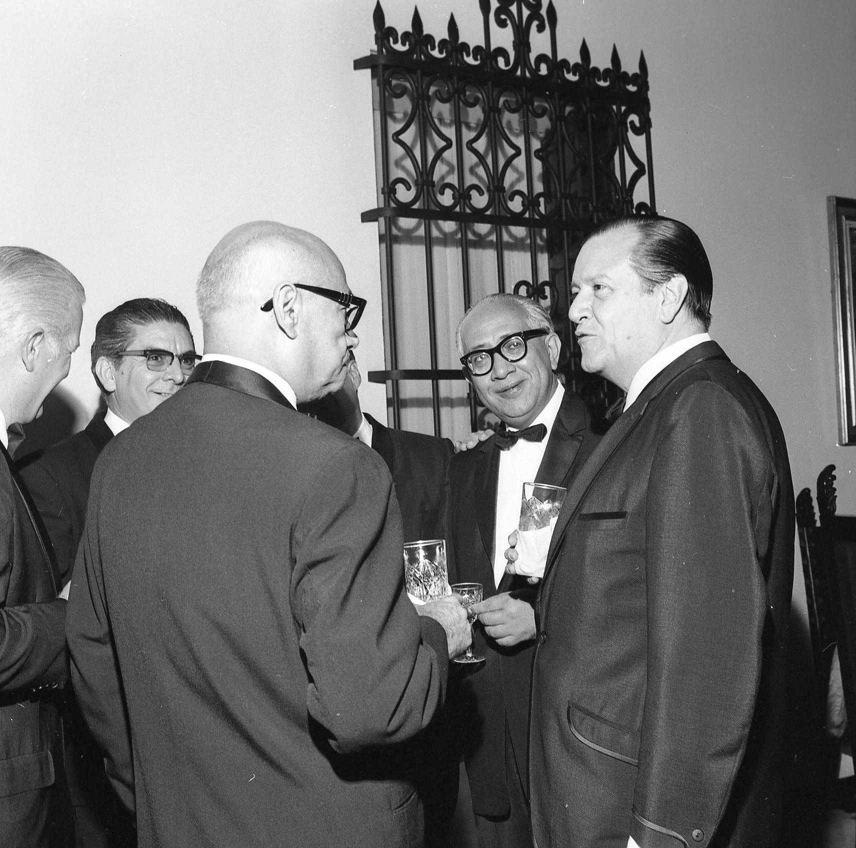 Rafael Caldera, Raúl Leoni y Ramón J. Velásquez, durante una cena de gala en homenaje a la familia Leoni en la residencia presidencial La Casona.